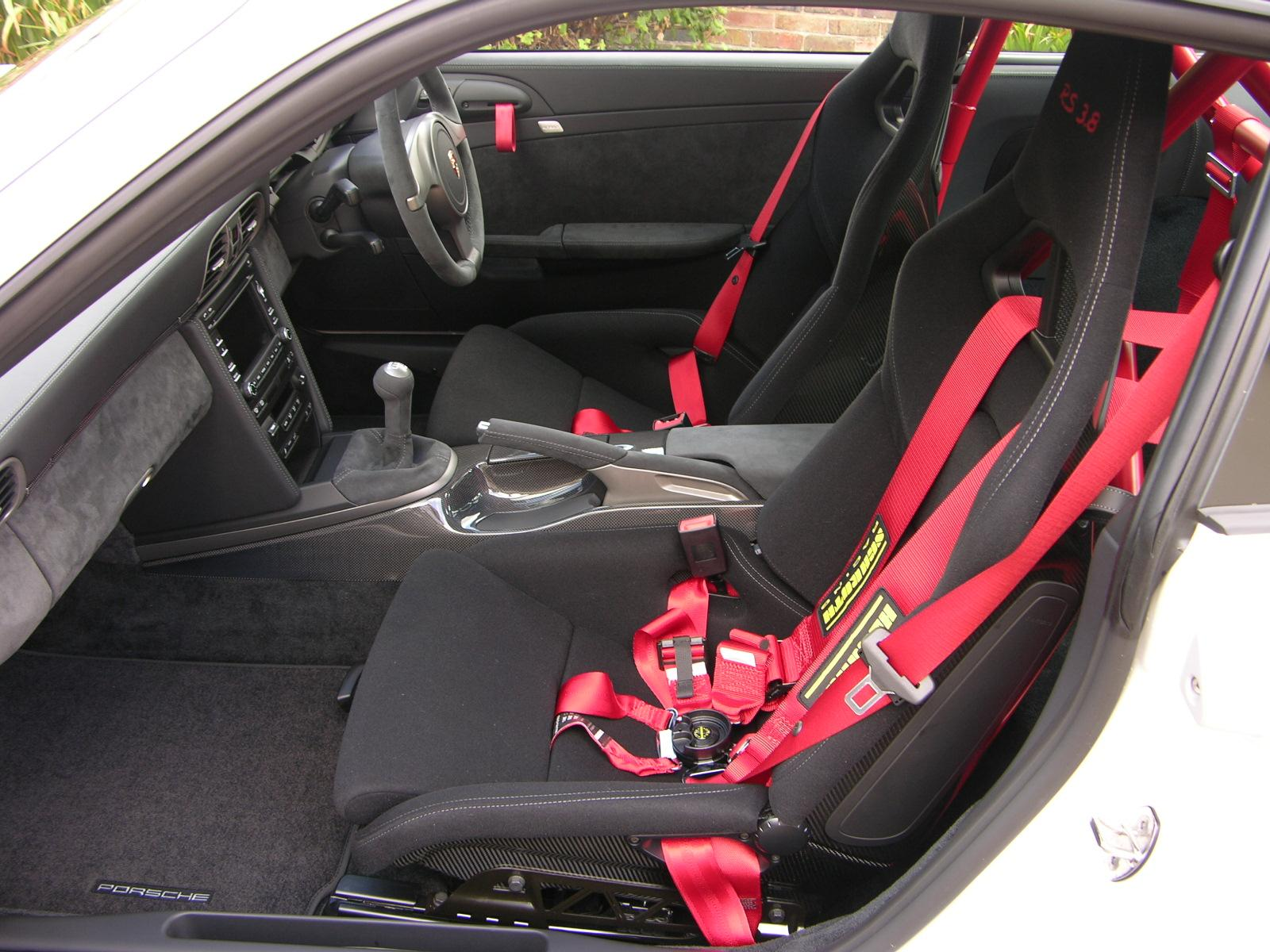 2010 Porsche 911 GT3 RS